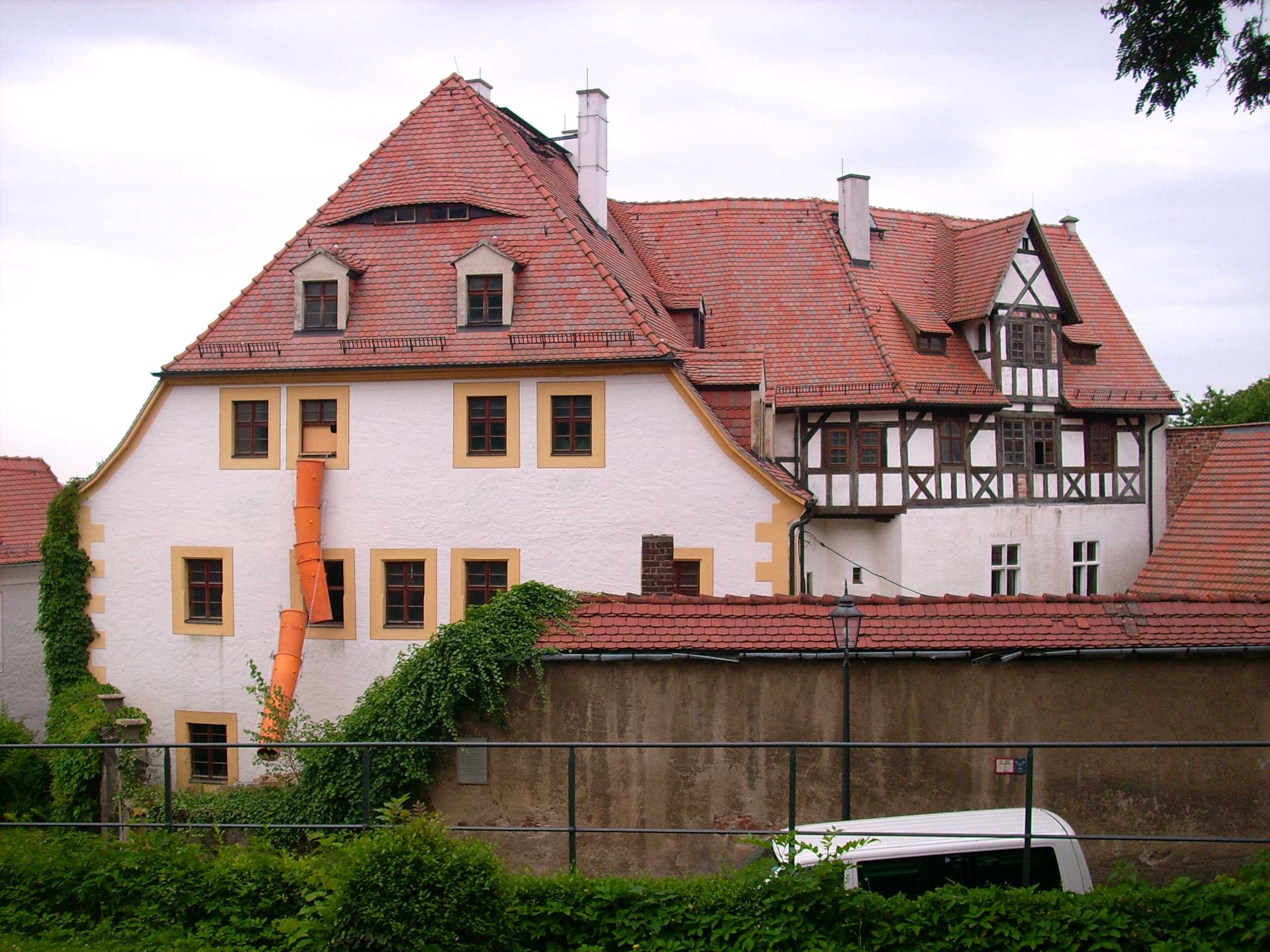 Wohnhaus, Freiheit 6 in Meißen